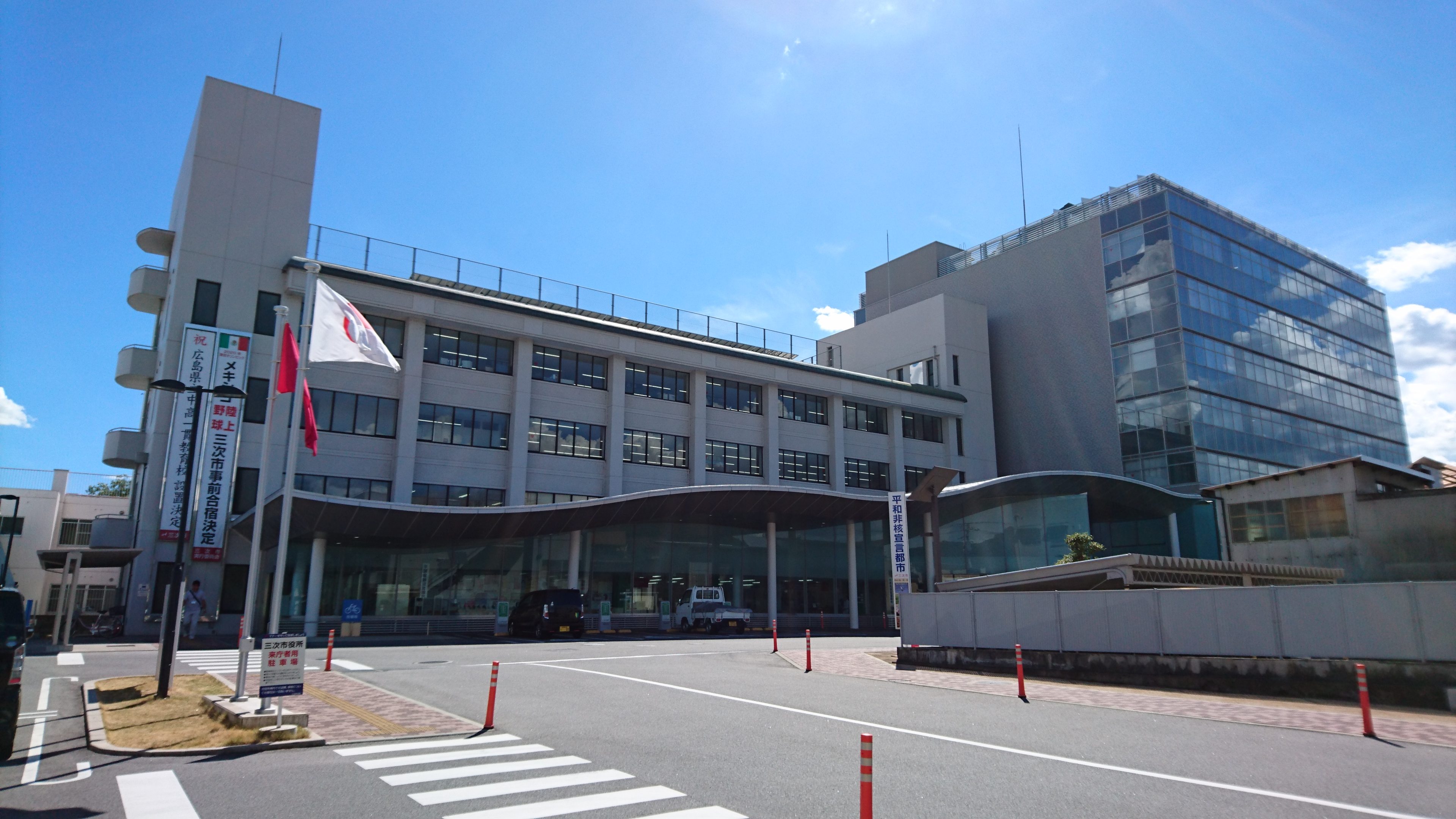 三次市役所の外観。